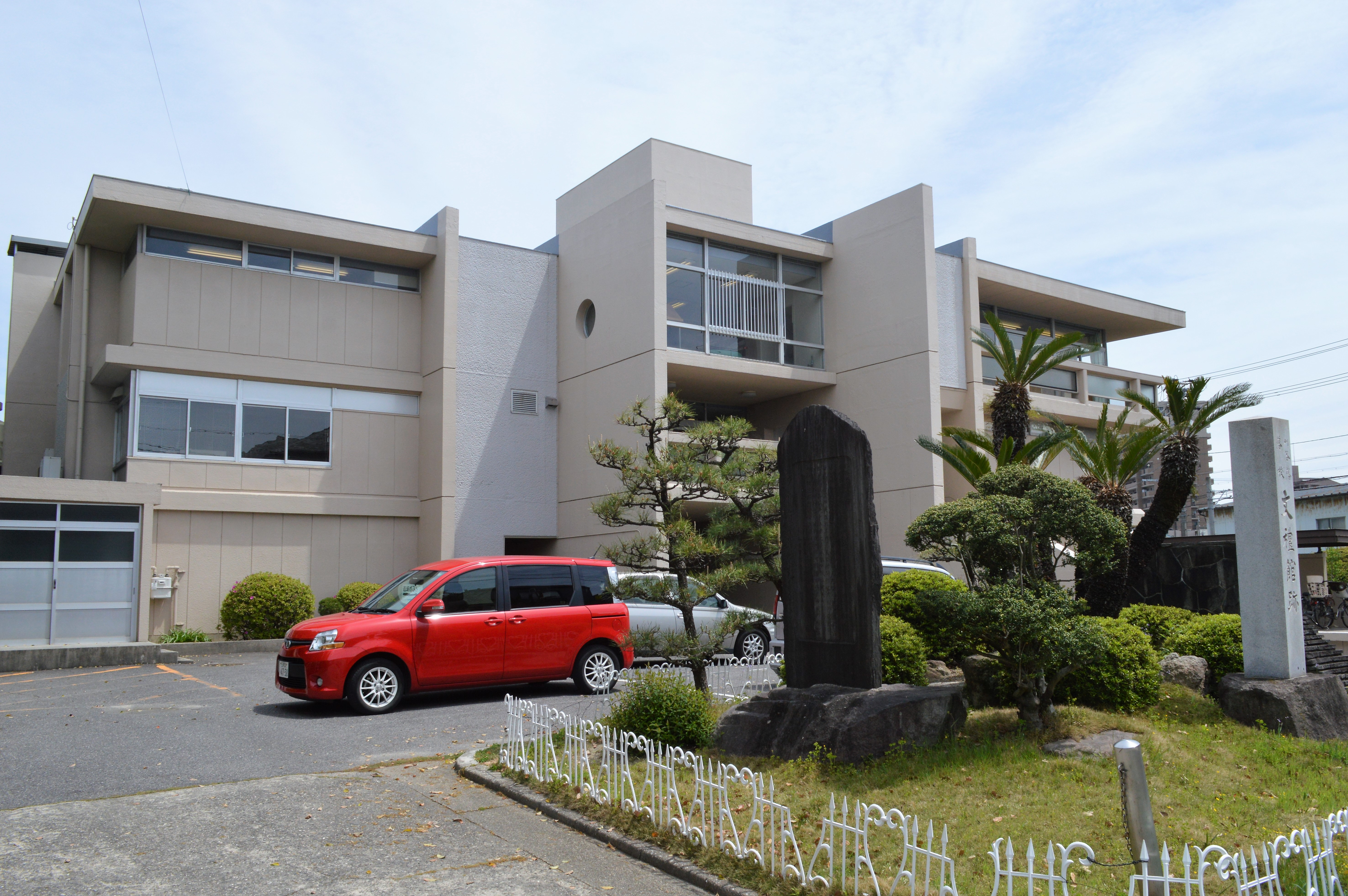 刈谷市城町図書館。手前右は「刈谷藩藩校 文礼館跡」の石碑。手前中央は刈谷町図書館の創設記念碑。